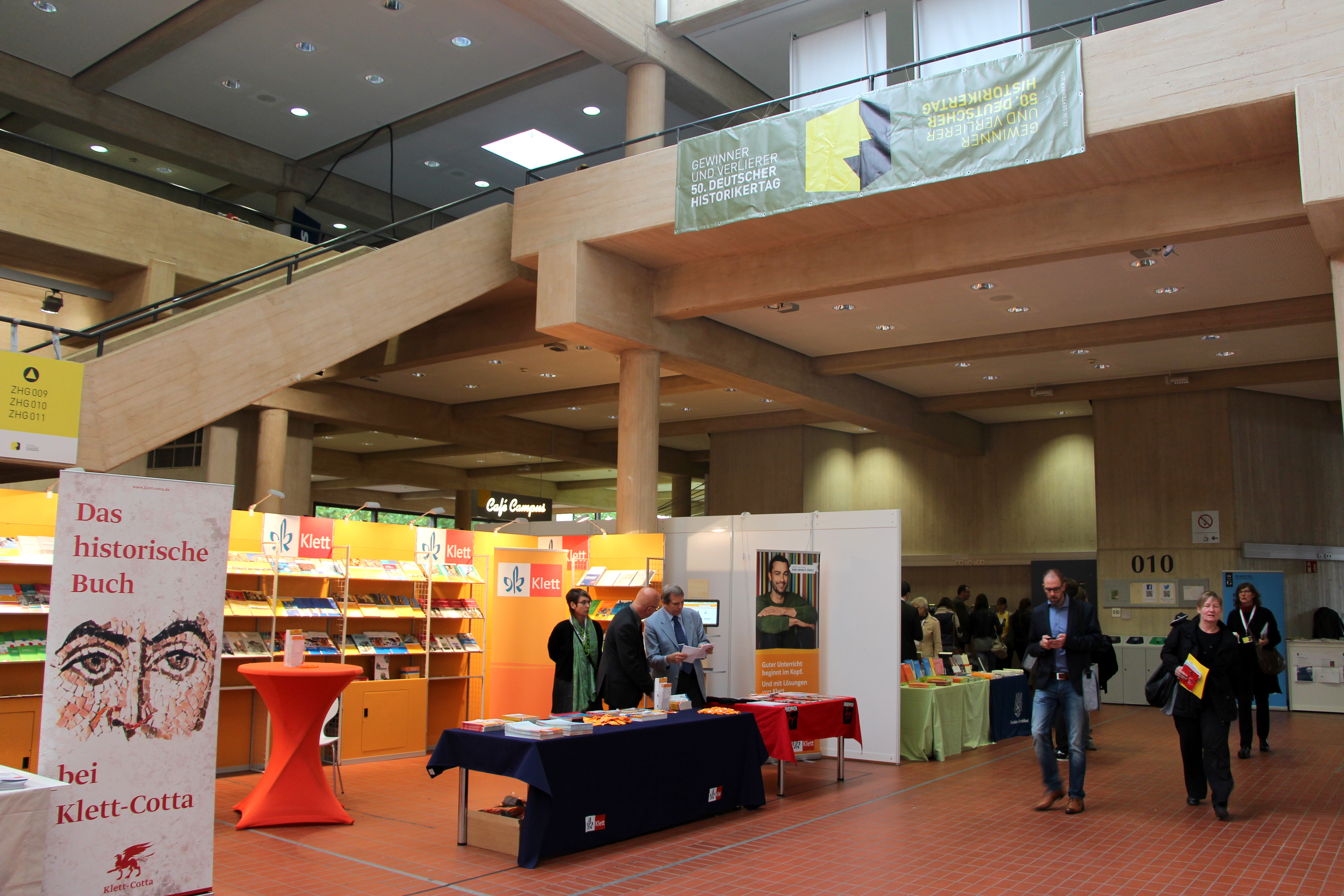 Historikertag 2014 in Göttingen.